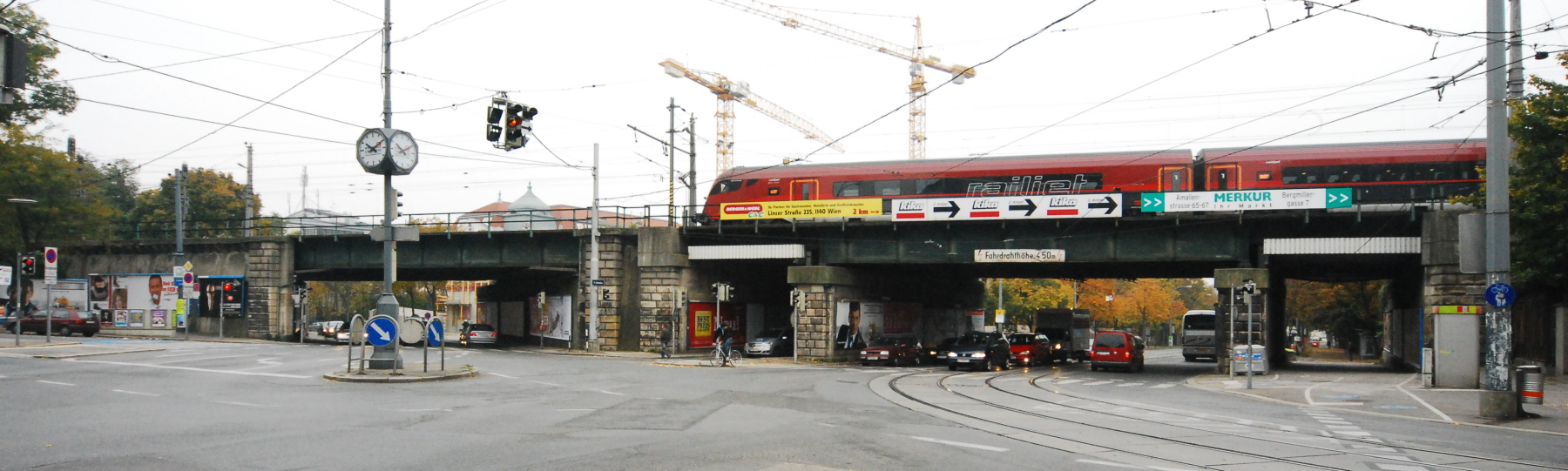 Westbahnbrücke über die Linzerstraße und die Schloßallee. Links die Durchfahrt für die Linzer Straße und rechts die Durchfahrt für die Schloßallee